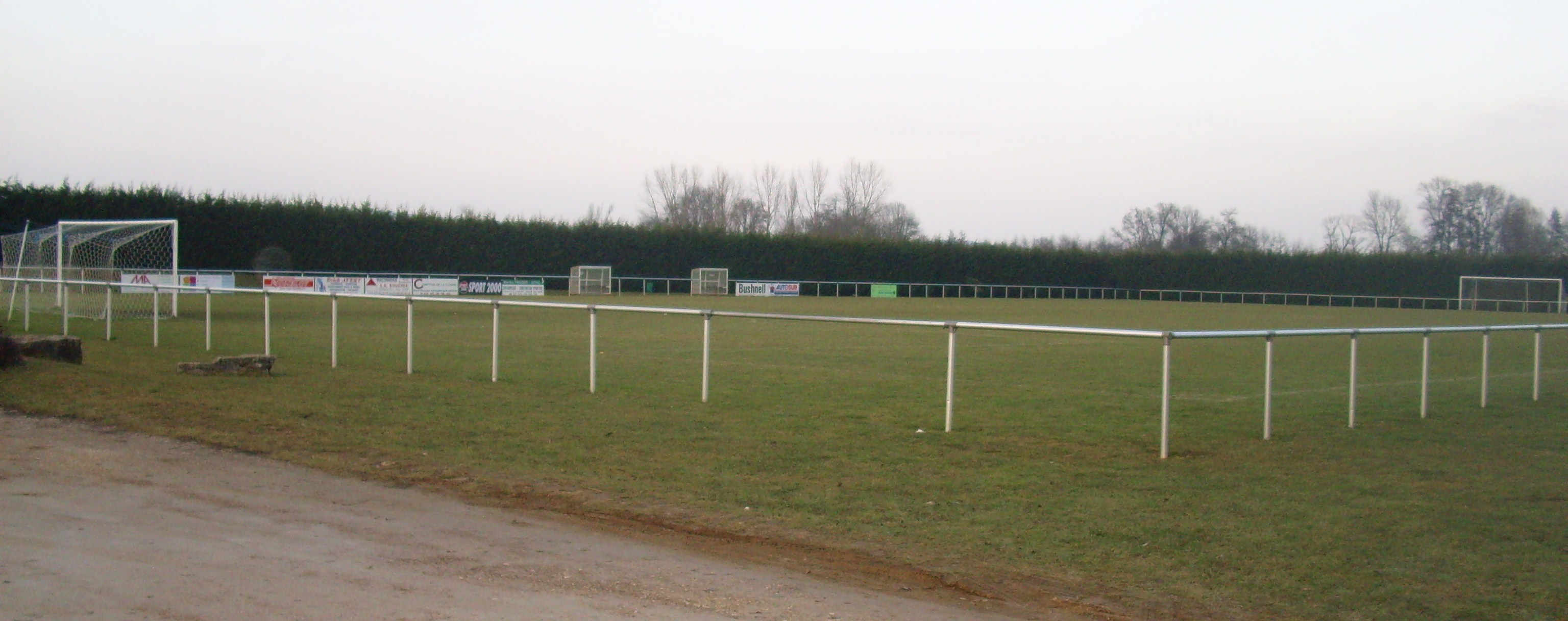 Stade de foot à Mellecey